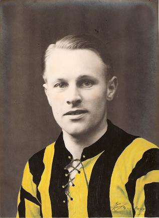 Gustaaf Van Goethem, voetbalspeler Berchem Sport, België